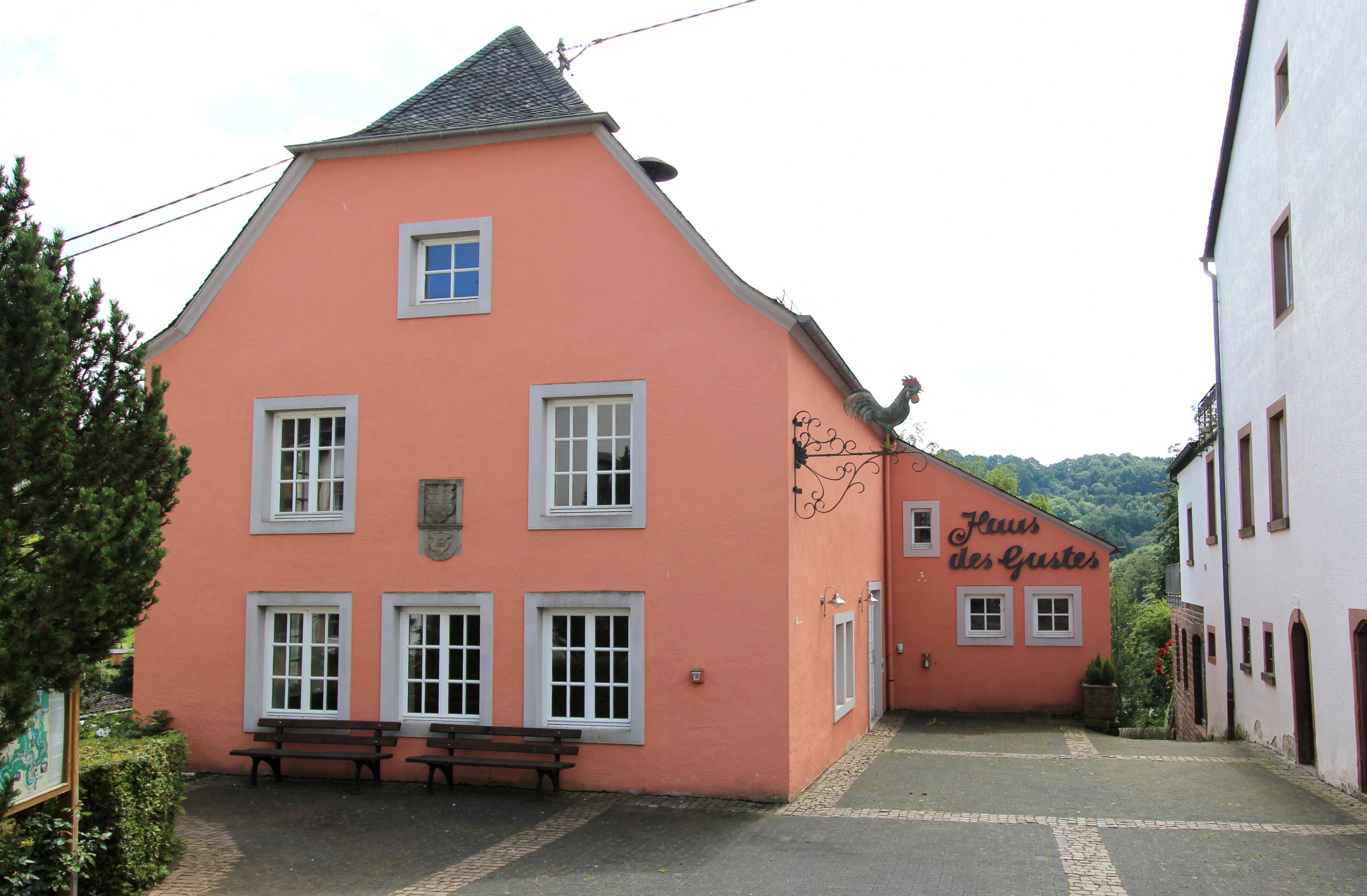 54655 Kyllburg/Eifel; Hochstraße 19. Fremdenverkehrsamt und Touristikbüro. Aufnahme aus Nord-Westen von 2016.